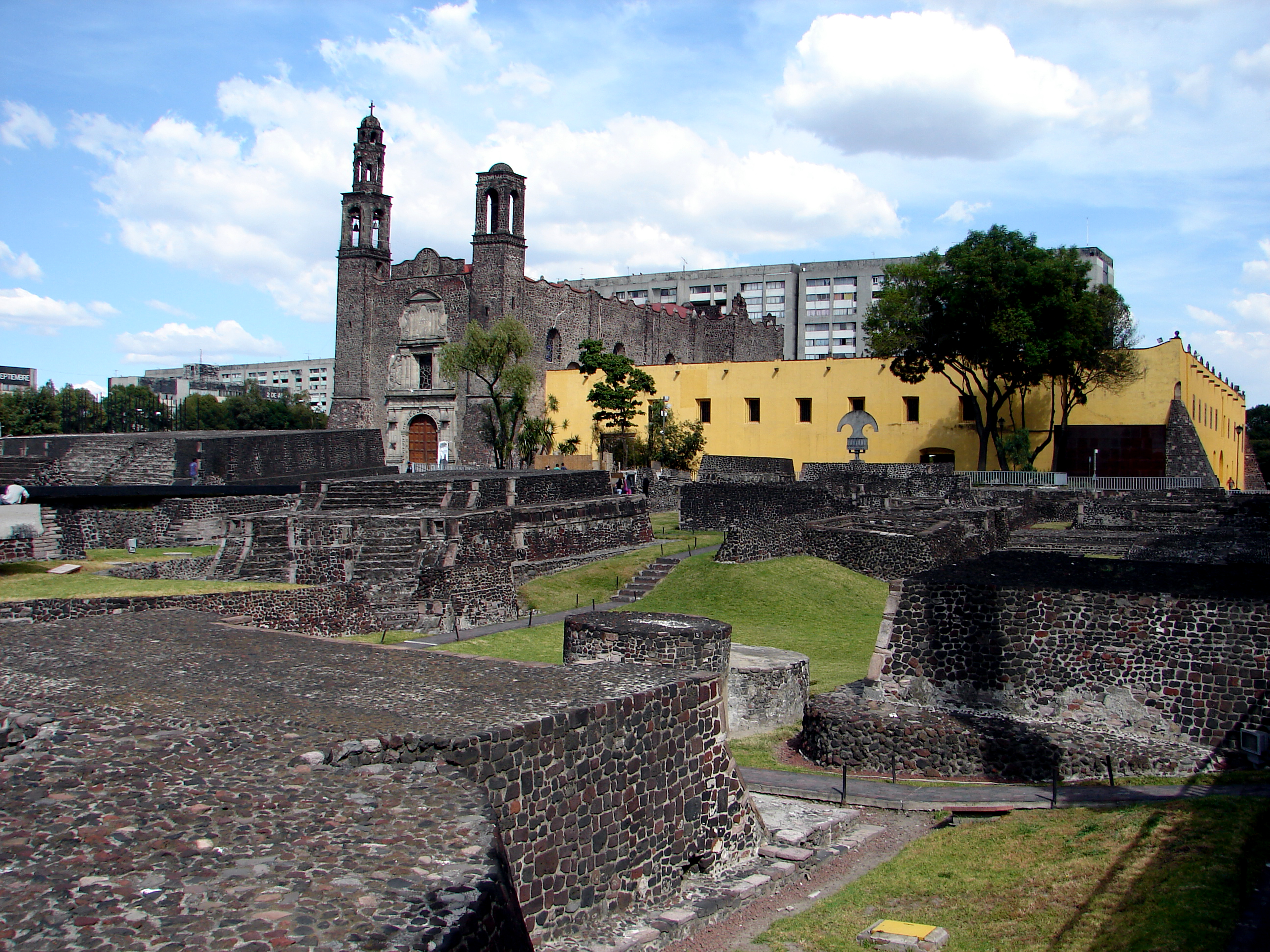 Templo y ex-convento de Santiago Tlatelolco, ubicado en la Plaza de las Culturas.